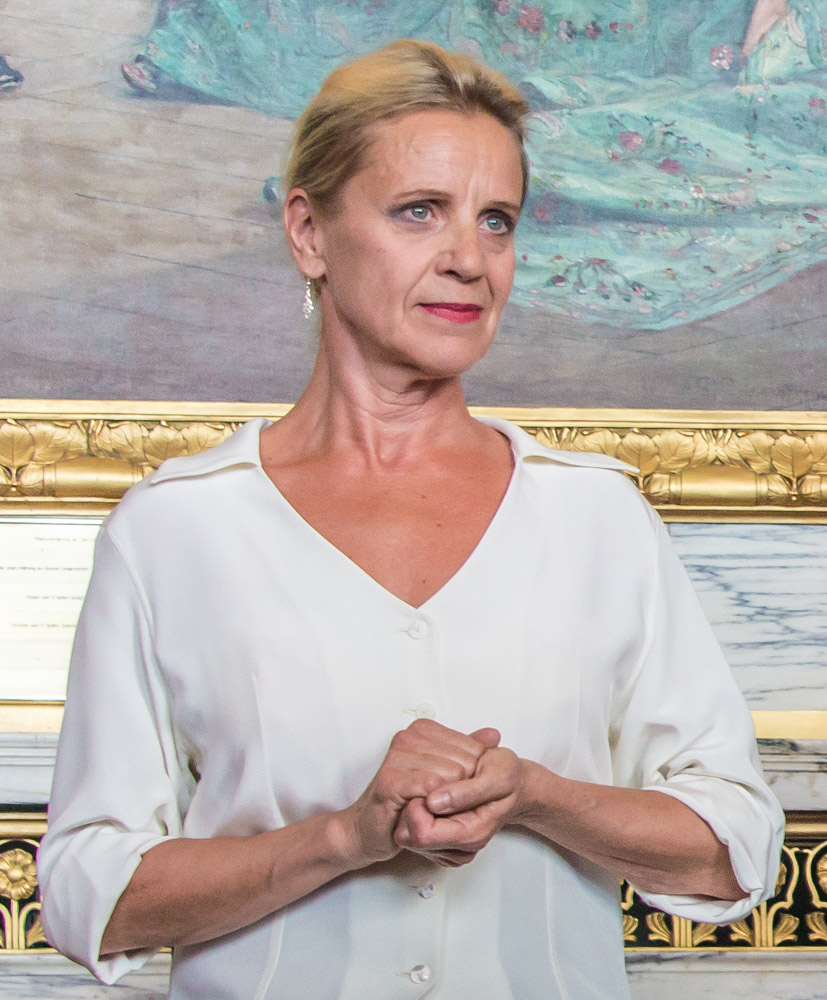 Ylva Ekblad under Dramatens höstsamling den 18 augusti 2015.